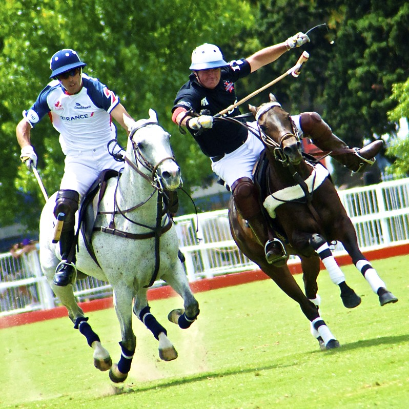 Campeonato Argentino de Polo 2010